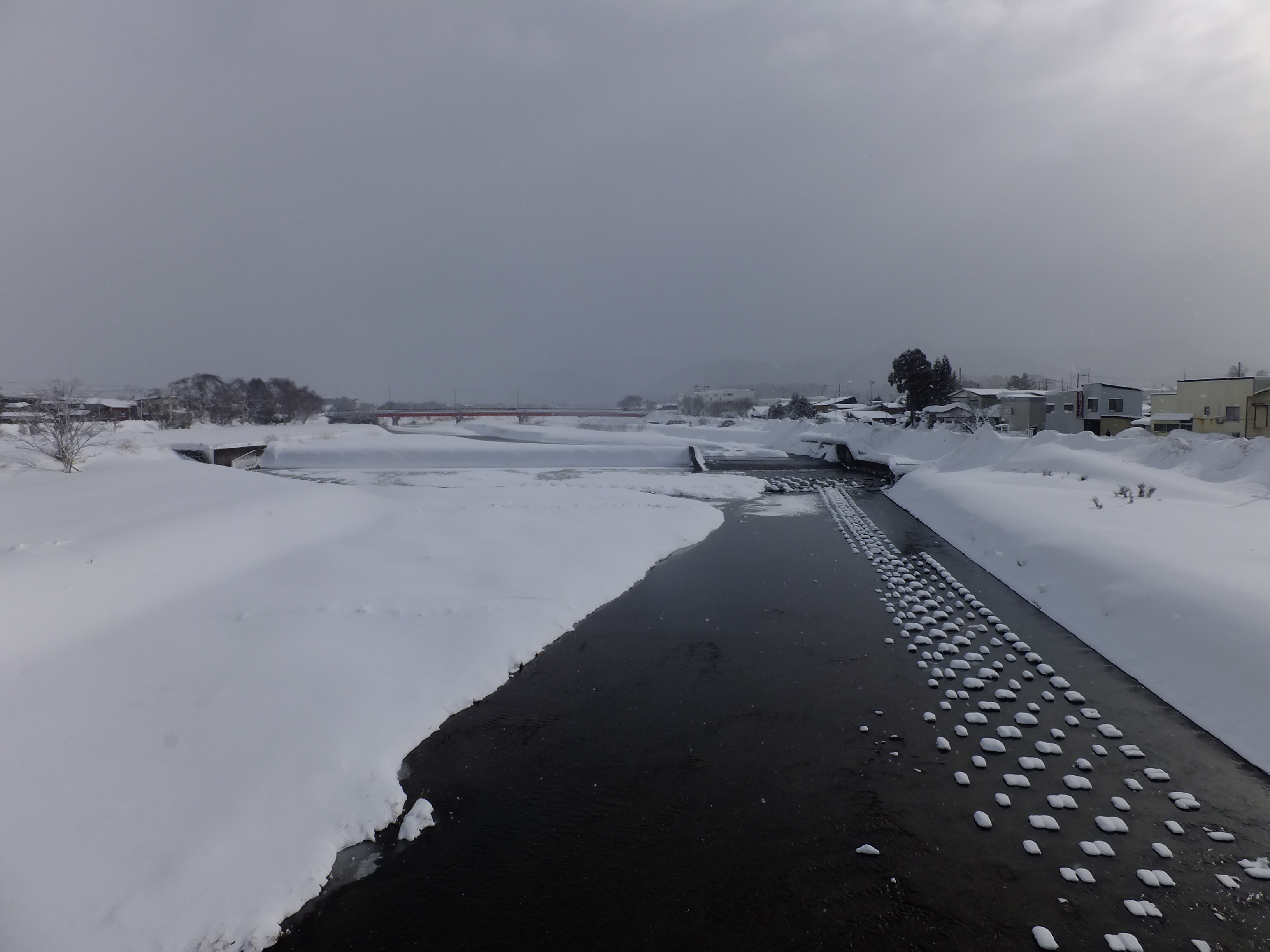 大館橋より望む長木川